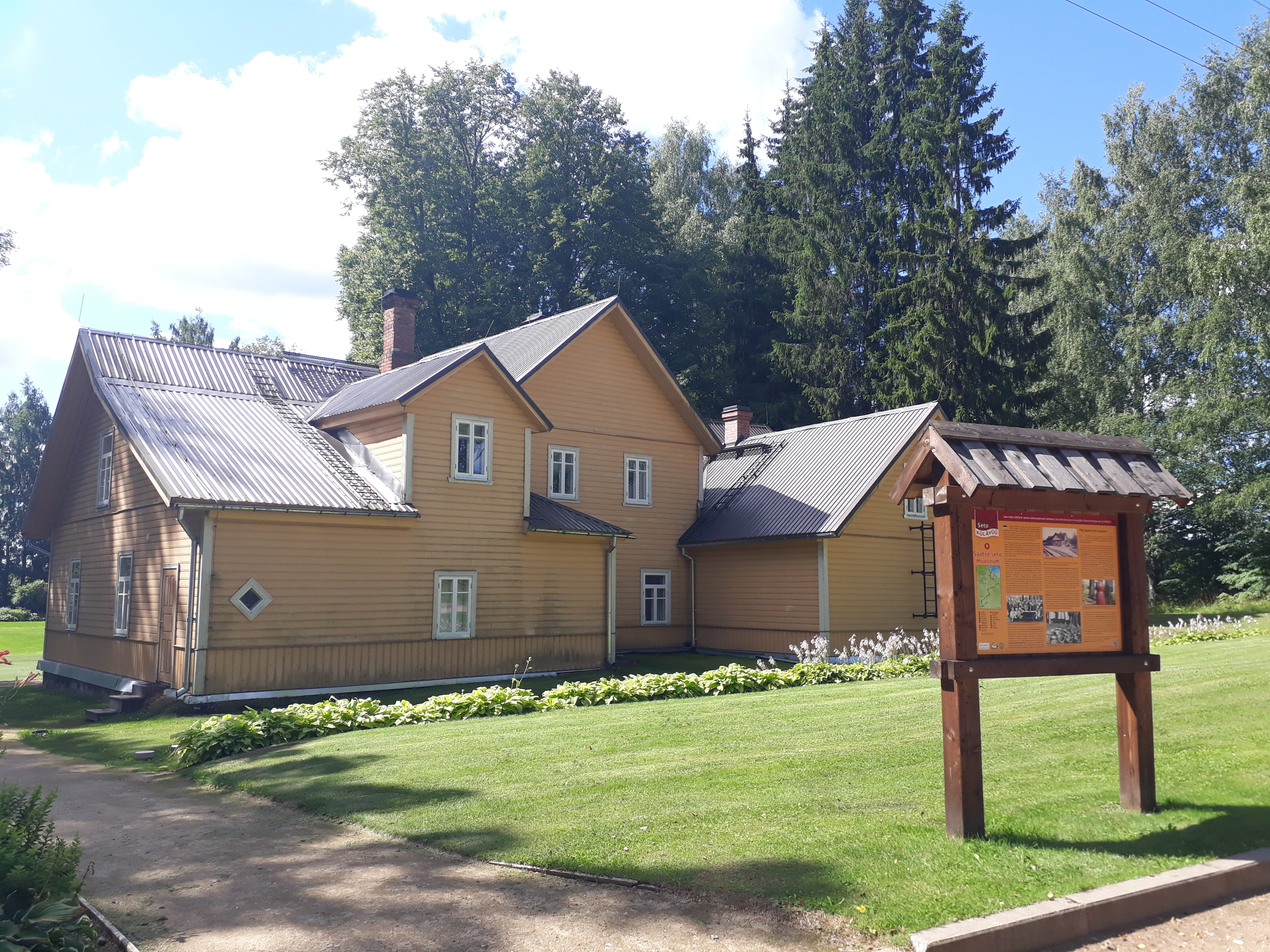 Saatse Seto Muuseumi hoone vaade, Samarina